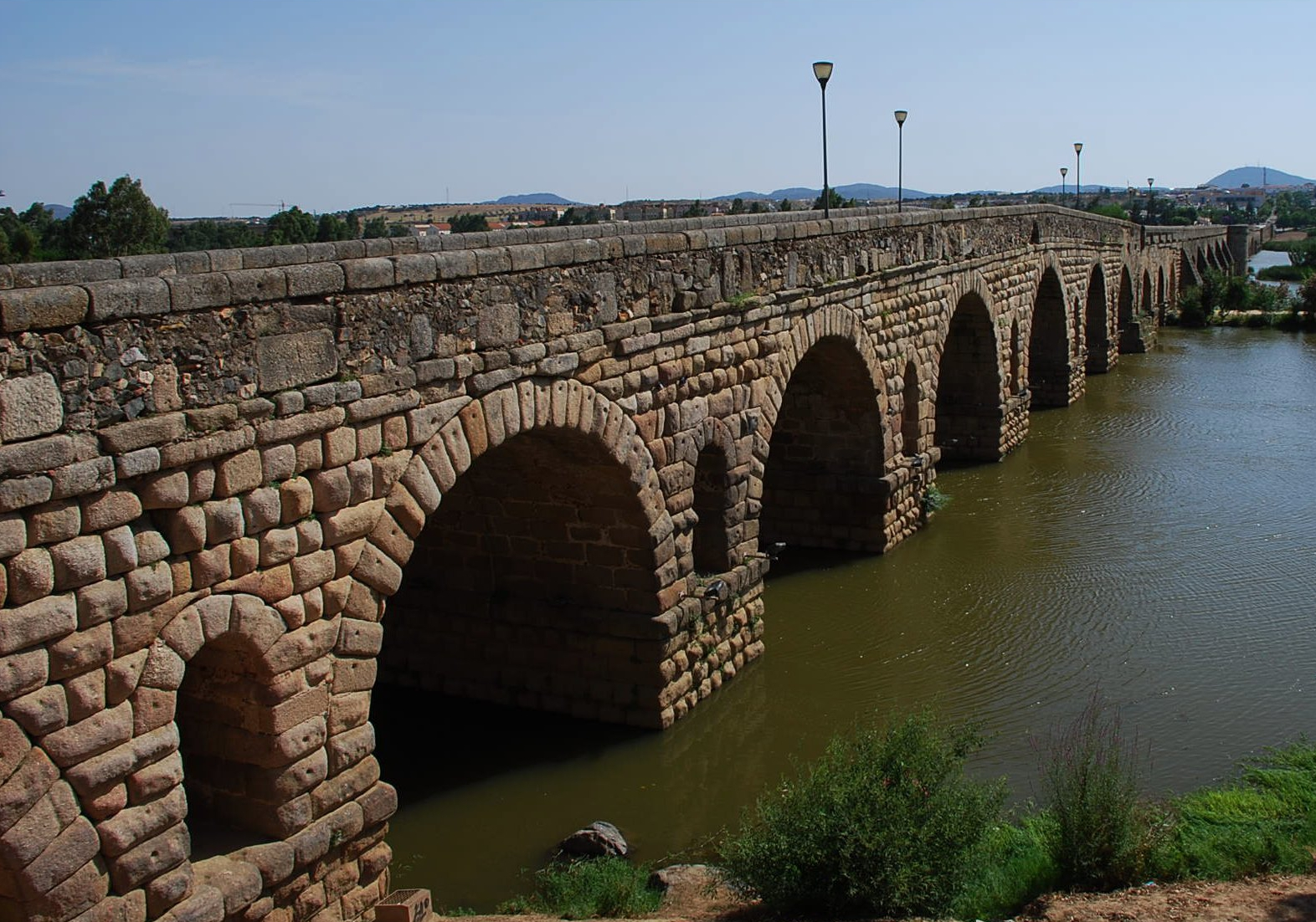 Puente romano sobre el Guadiana en Mérida, provincia de Badajoz (España).